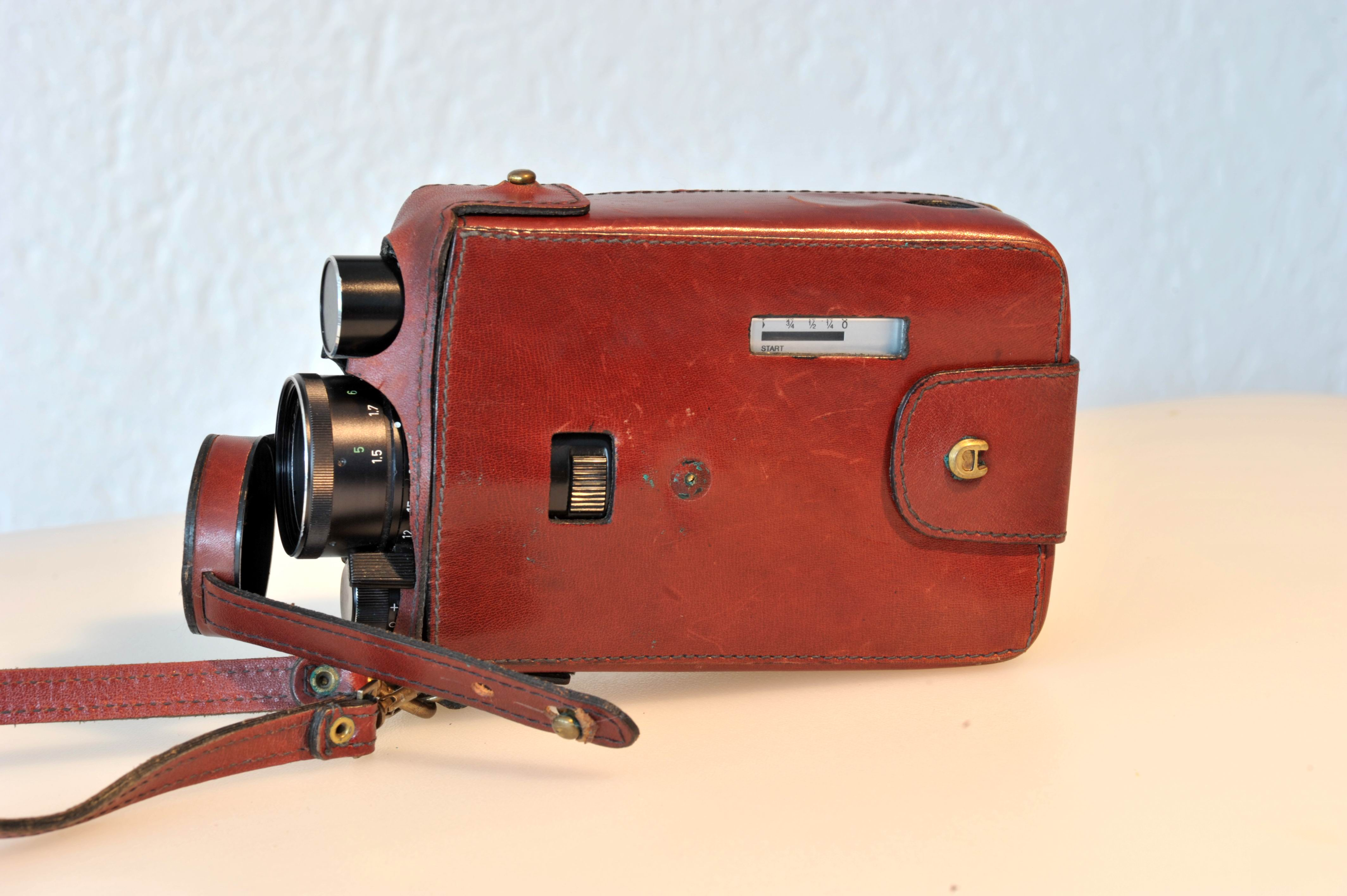 AGFA Microflex 300 Sensor im Etui von Etienne Aigner